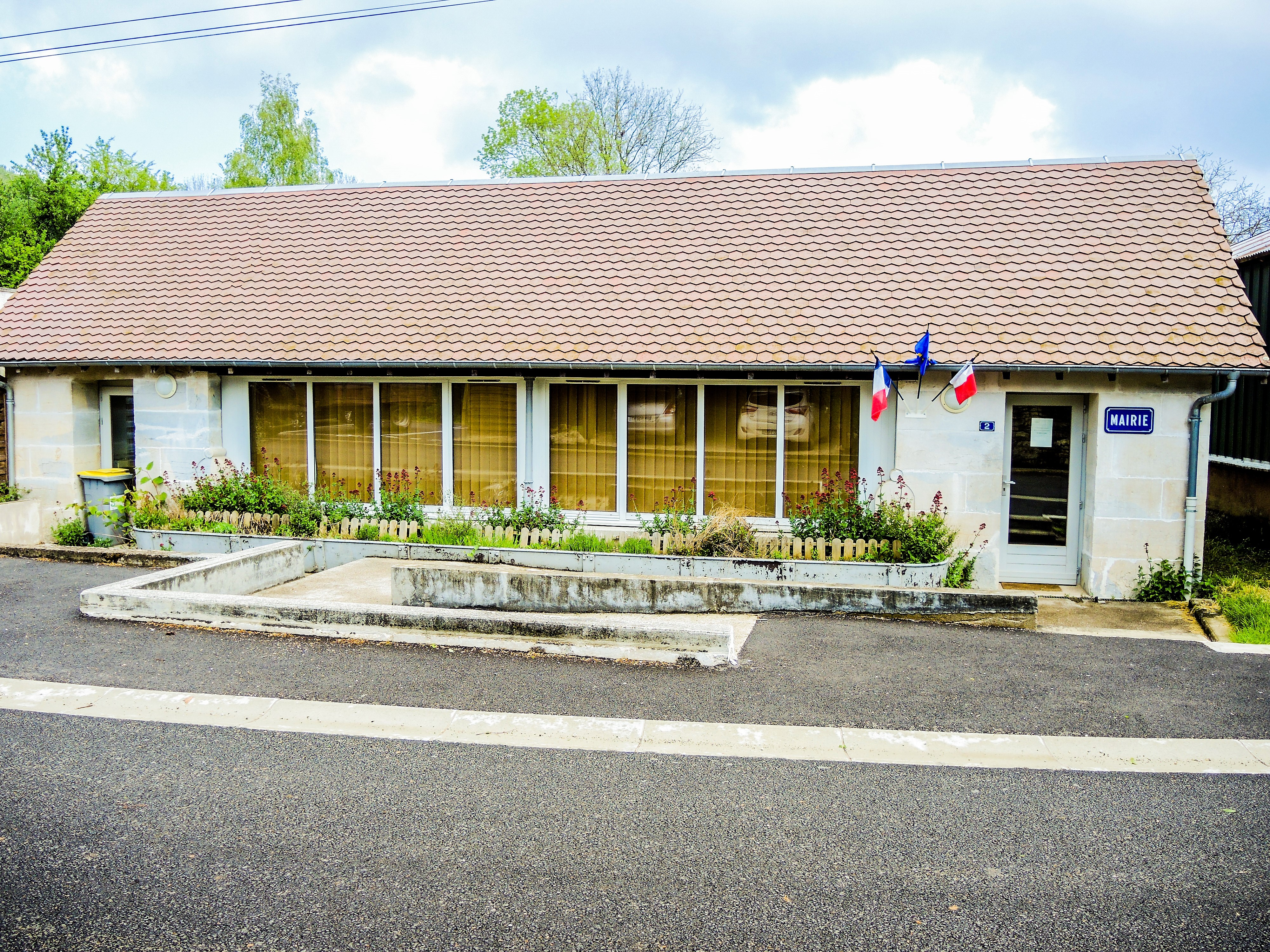 Mairie du village